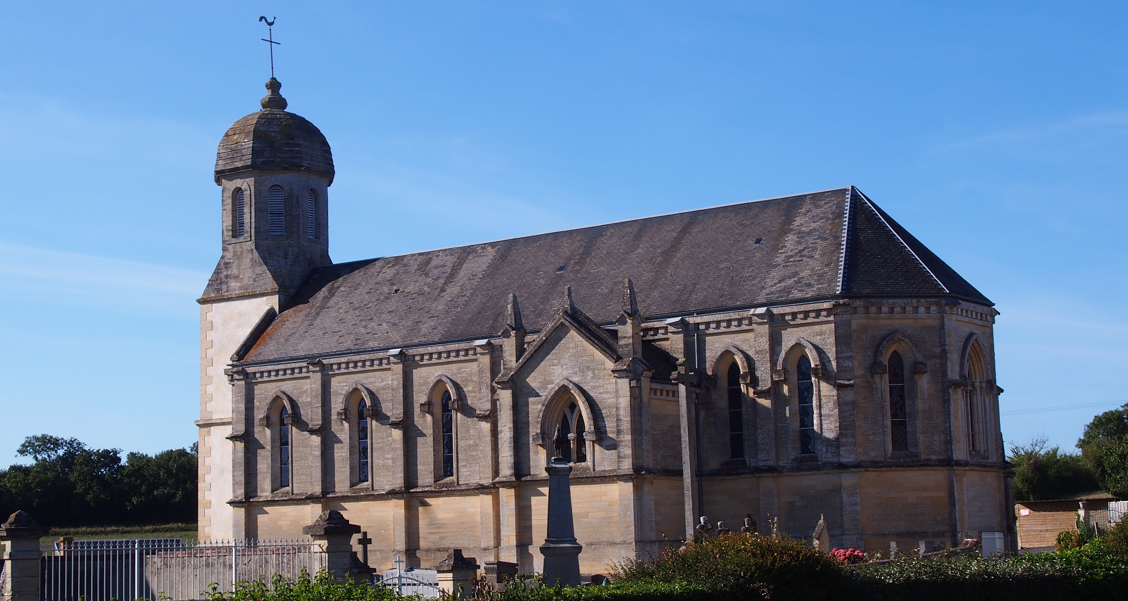 Saint-Germain-du-Pert (Normandie, France). L'église Saint-Germain.